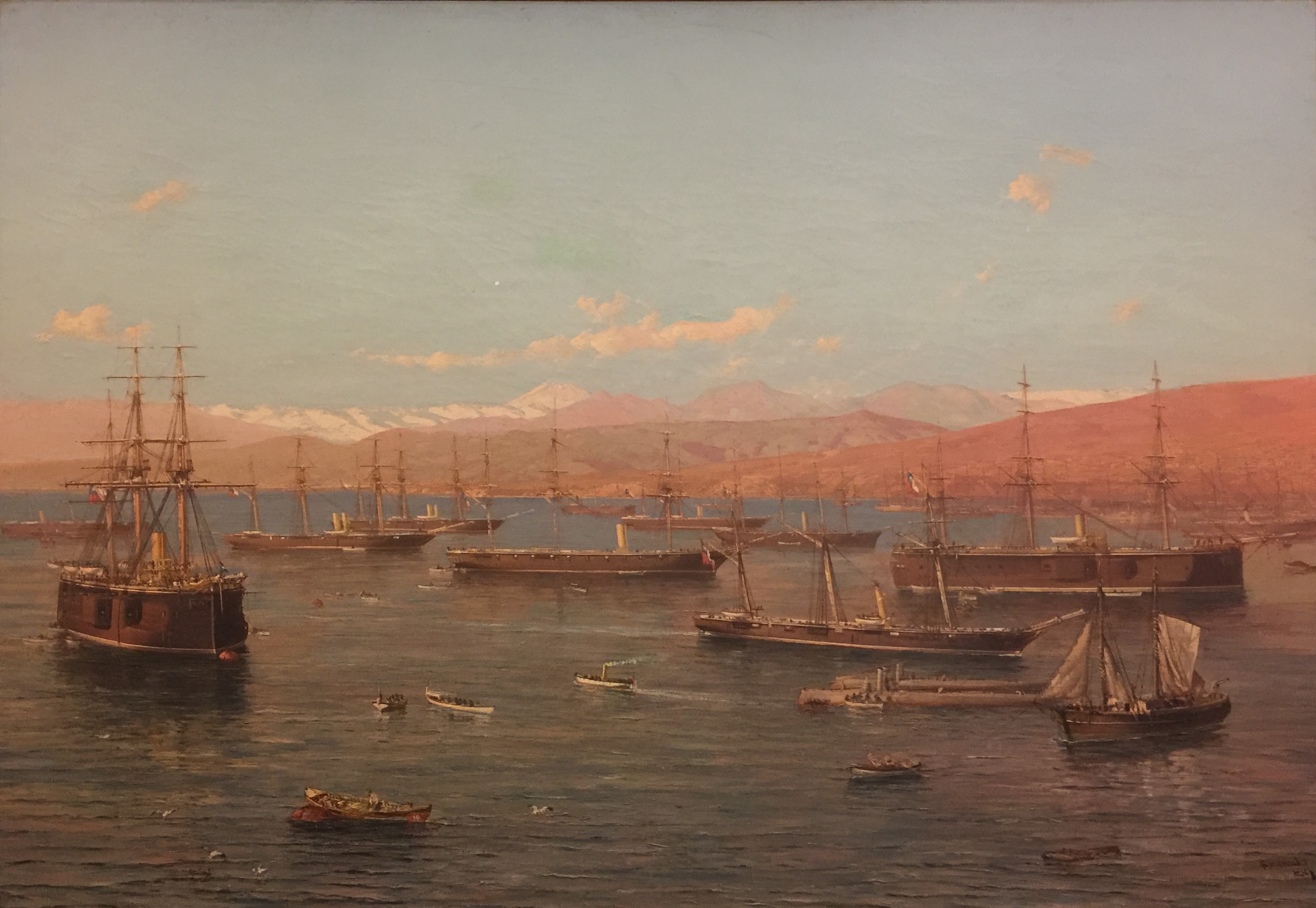 Óleo sobre Tela de Thomas Somerscales. Antes de la Campaña La escudra Chilena se encuentra fondeada en la Bahía de Valparaíso el 5 de abril de 1879.